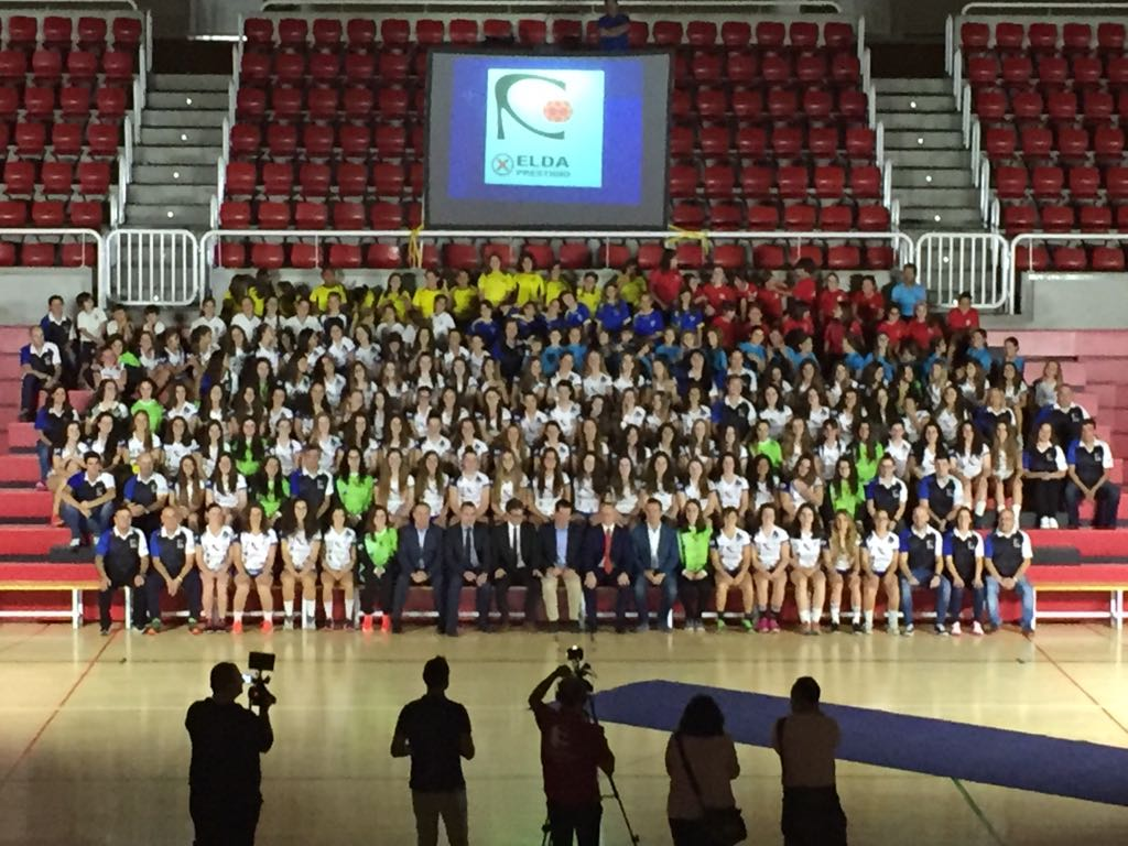 plantilla del Club con personalidades 2017/2018